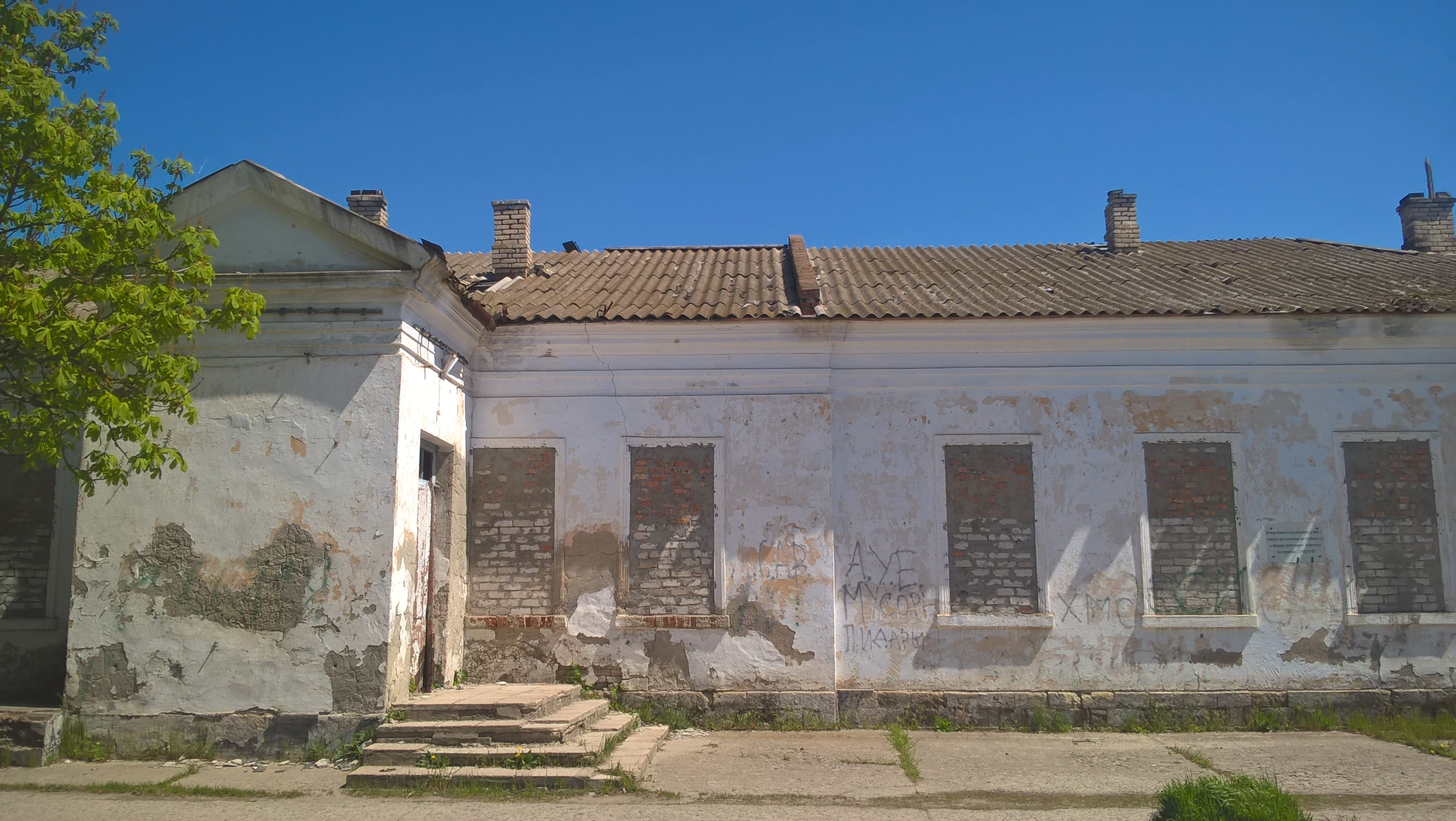 Oczaków, budynek, w którym odbył się sąd nad uczestnikami buntu na krążowniku Oczakow